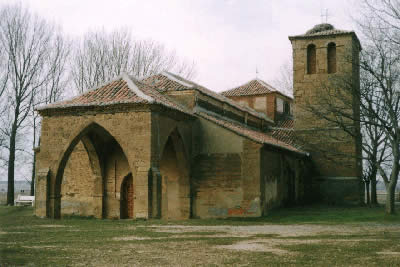 Foto de la cara oeste de la ermita de la Virgen de la Vega en Cimanes de la Vega (león, Castilla y León).